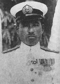 入佐俊家海軍少将